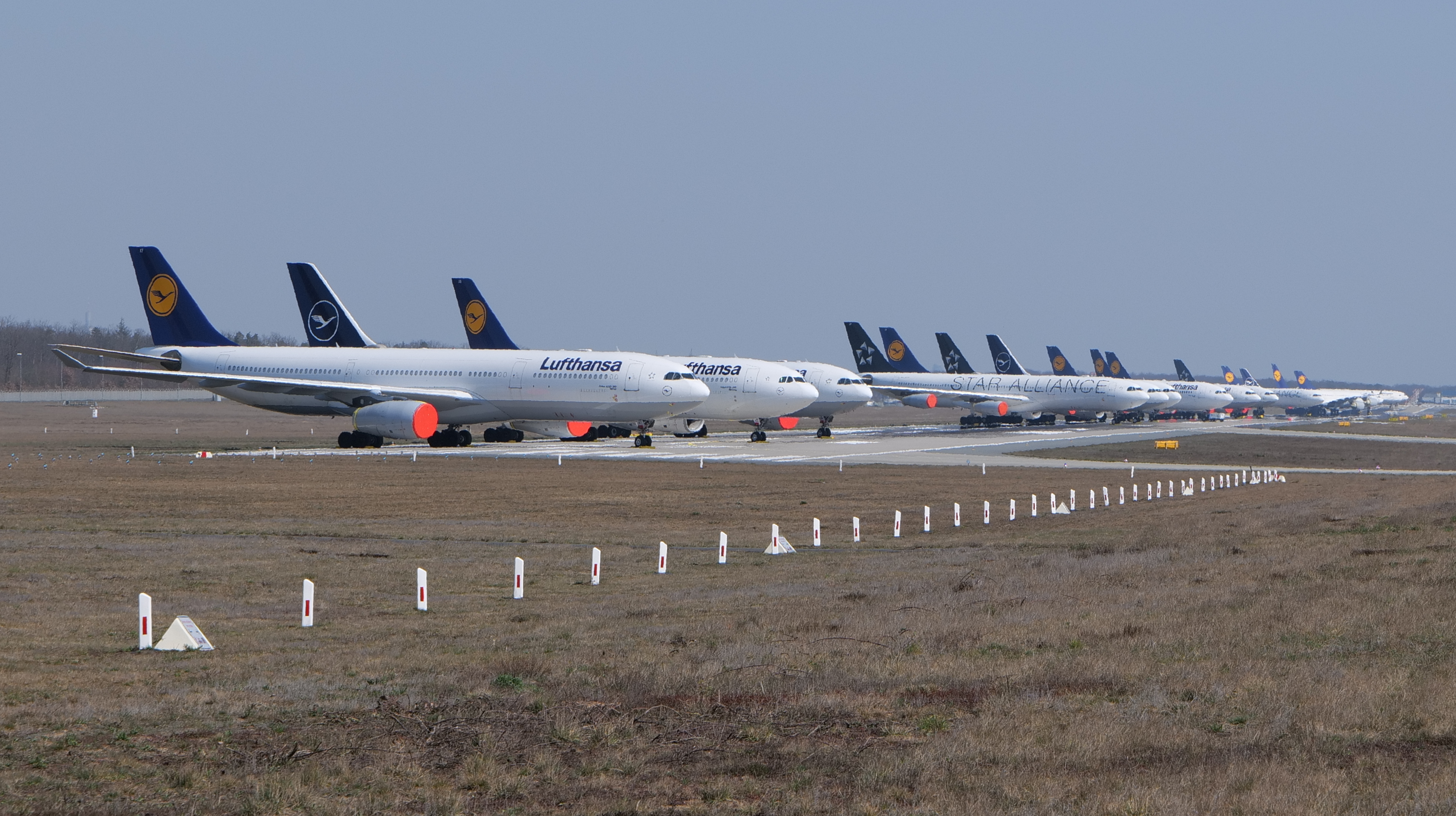 Aufgrund der COVID19 Pandemie nicht genutzte und auf der Landebahn Nordwest des Frankfurter Flughafens abgestellte Flugzeuge am 27. März 2020.